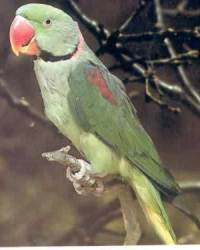 Psittacula_eupatria, Ожереловый попугай Александров. Alexandrine parrakeet